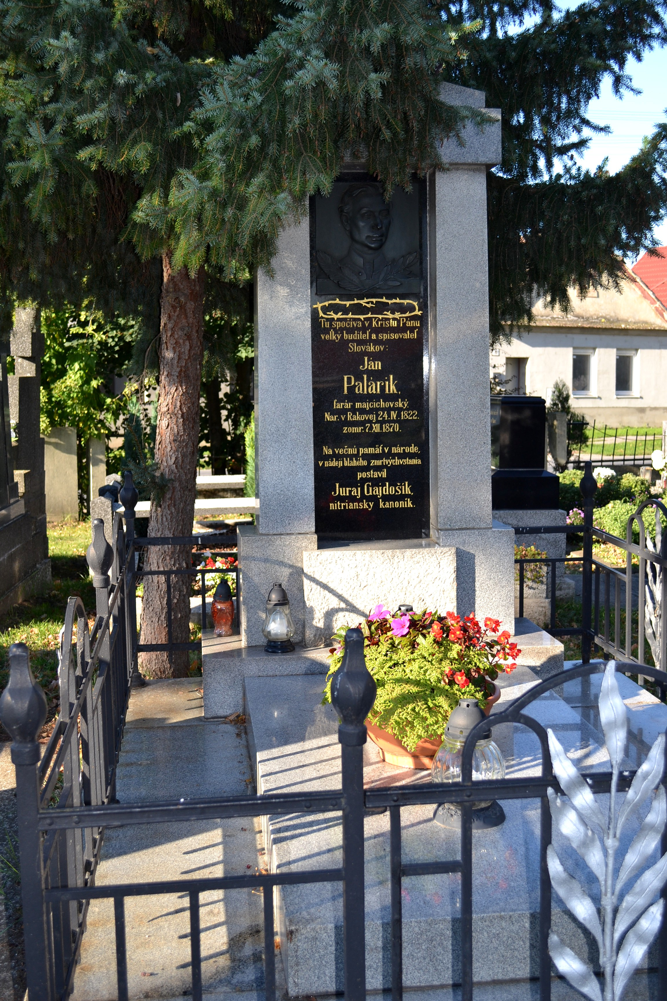 Majcichov (okr. Trnava), hrob spisovateľa a kňaza Jána Palárika, ktorý v tunajšej obci pôsobil v rokoch 1862 - 1870 ako farár